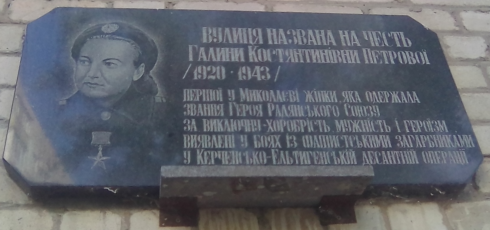 Меморіальна дошка Герою Радянського Союзу Петровій Галині Костянтинівні на будинку № 1 по вул. Галини Петрової (м. Миколаїв)